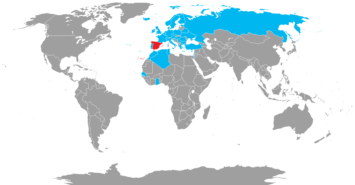 Destinos de Vueling Airlines